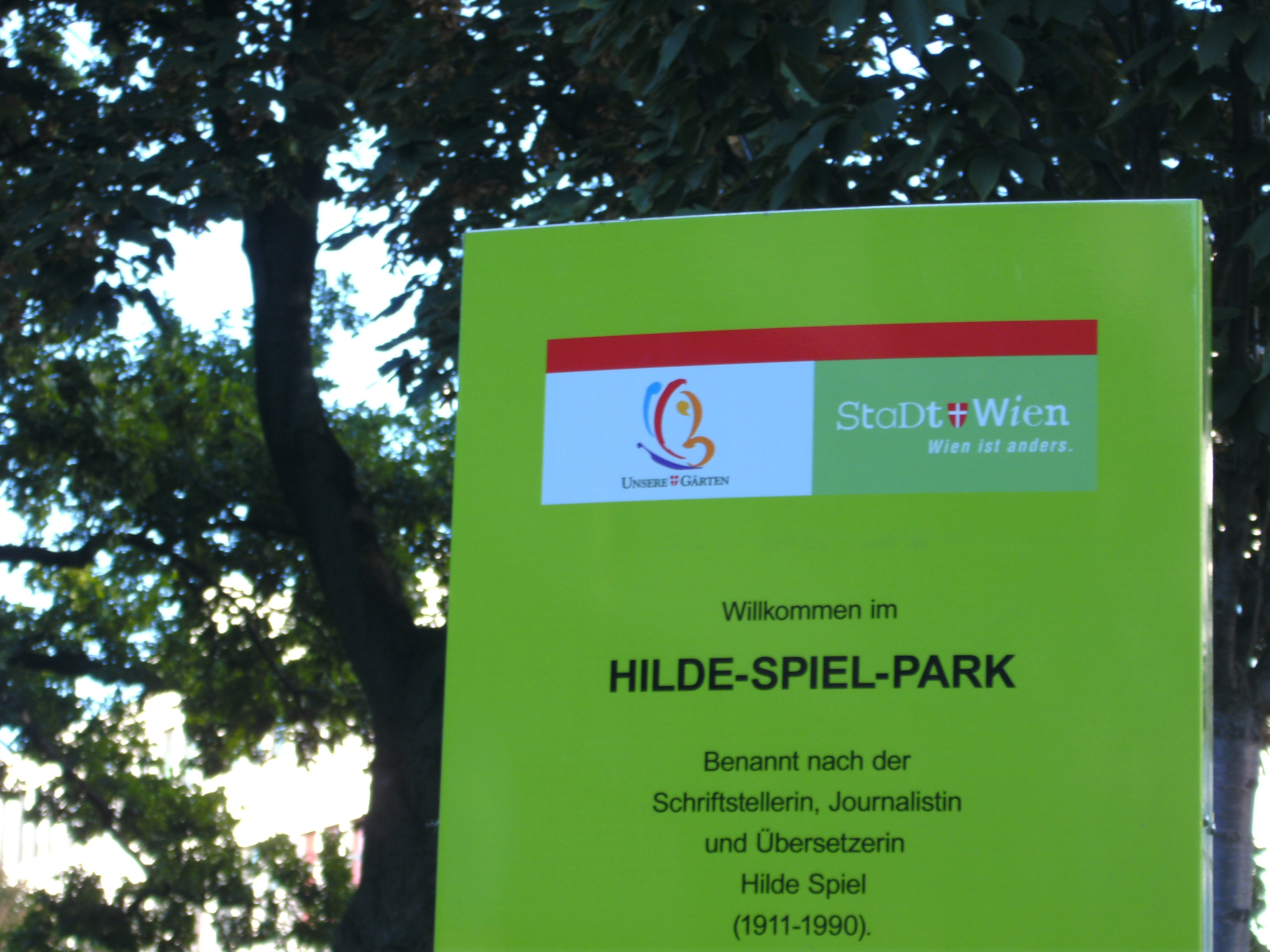 Wiener Park benannt nach der Schriftstellerin